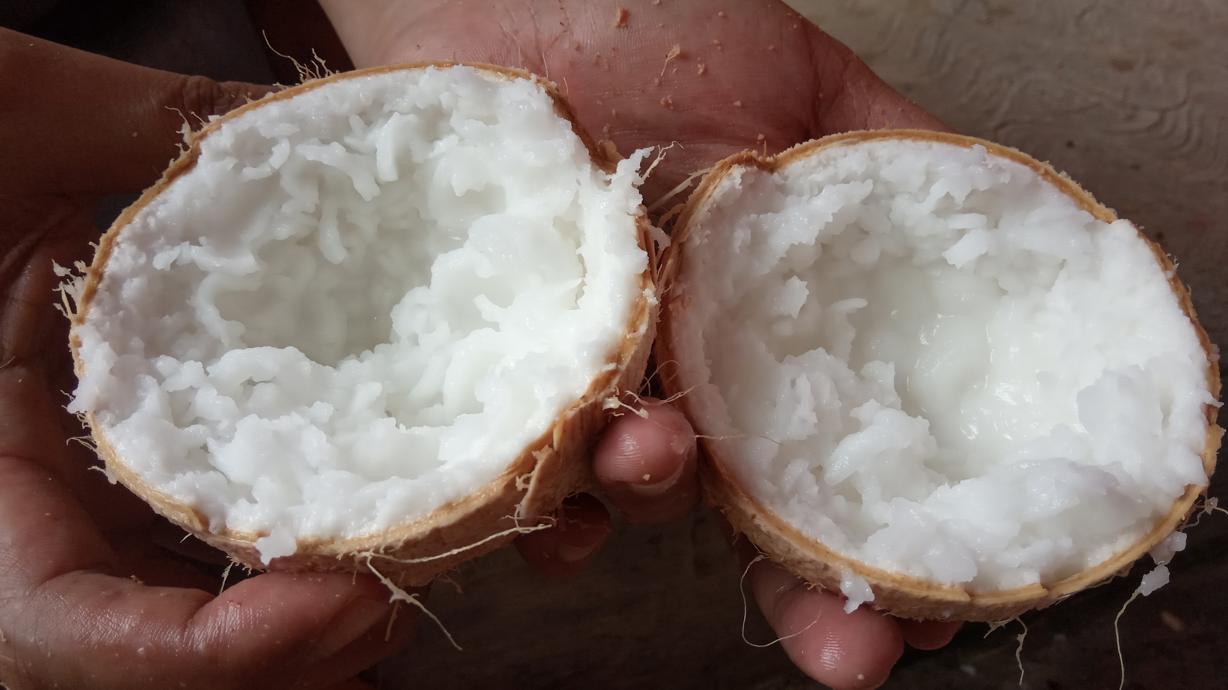 Kelapa Kopyor / Macapuno Coconut